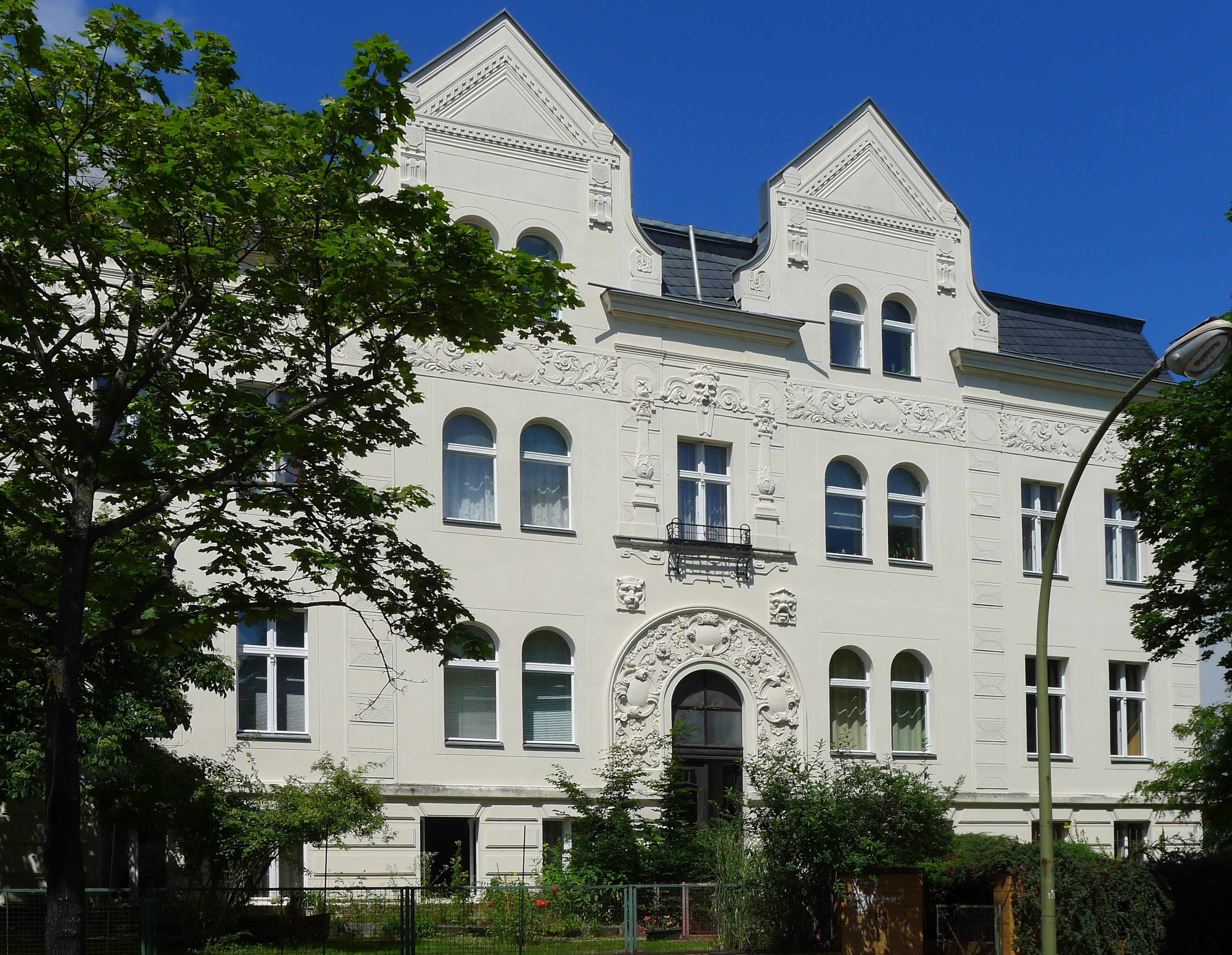 Mietshäuser